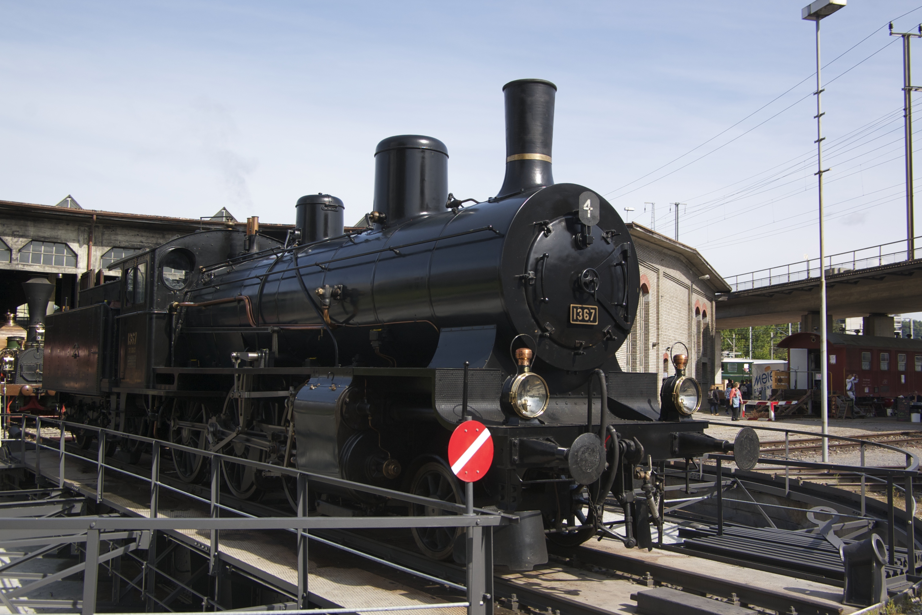 Dampflocomotive Nr. 1367 des Typs B 3/4 der Schweizeriſchen Bundesbahnen, gebaut 1916 inn der Schweizeriſchen Locomotiv- und Machines-Fabrique zů Winterthur (Fabr.-Nr. 2557), 1964 außer Dienſt geſtellt und fürs Verkehrshaus der Schweiz reſervirt, 1978 betriebsfähig aufgearbeitet, 2001 an die Stiftung Historiſches Erbe der SBB; aufgnommen am 31. Mai 2015 im Fahrzeug-Dépôt zů Brugg.